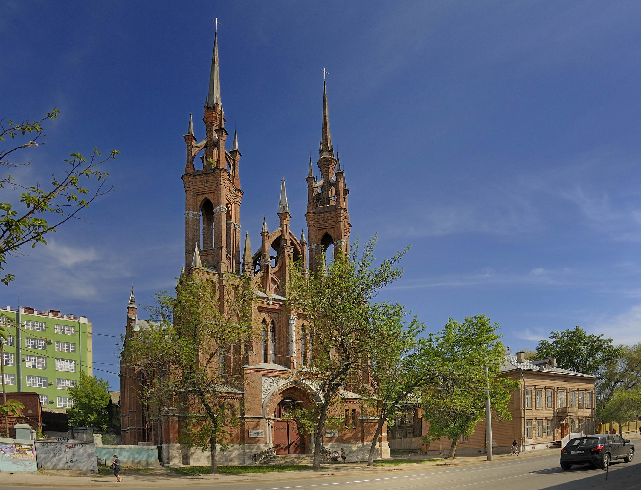 Костел, г.Самара, ул.Фрунзе